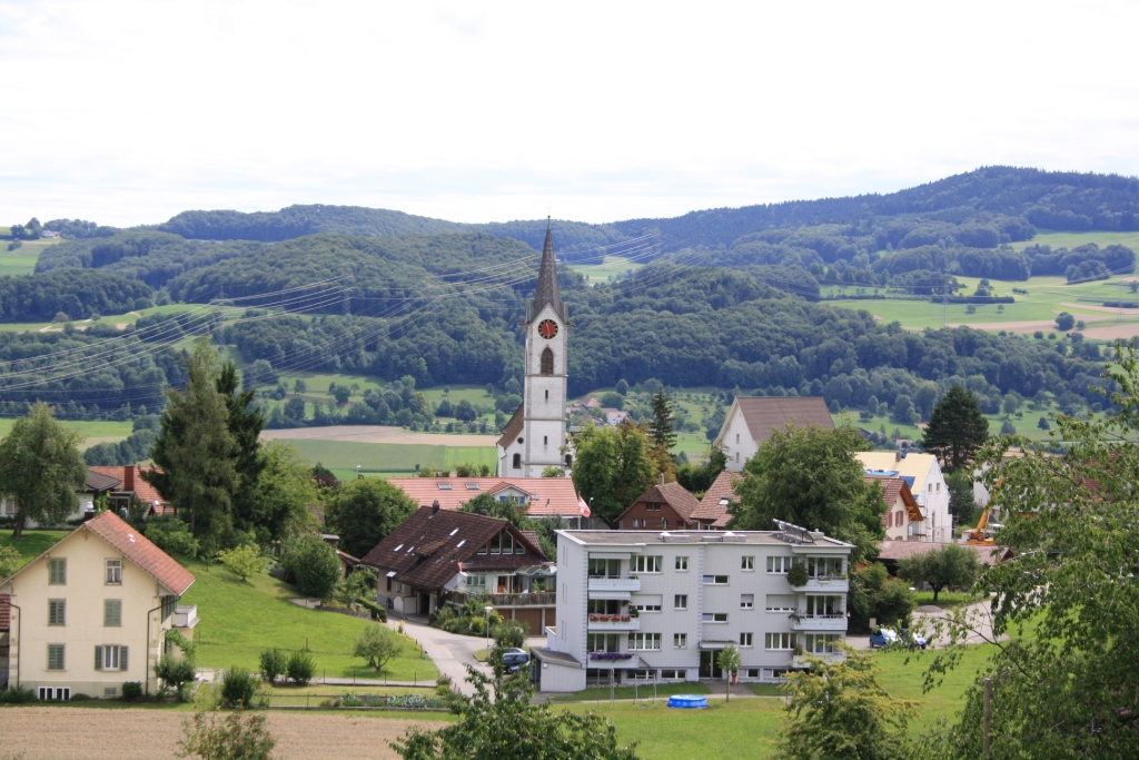 Reitnau